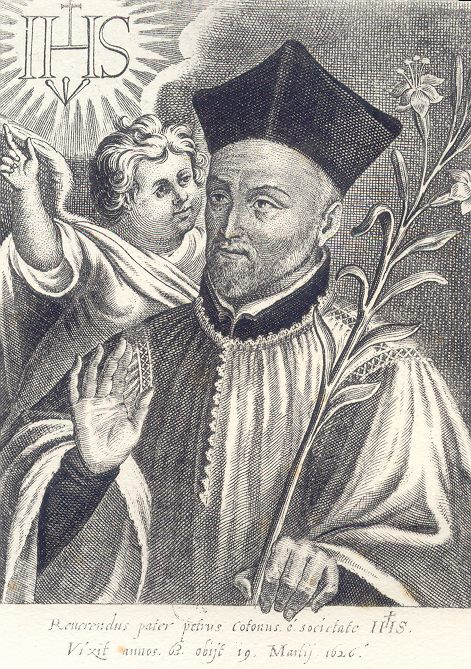 Photo d'une gravure de Pierre Coton, jésuite, confesseur du roi Henri IV de France